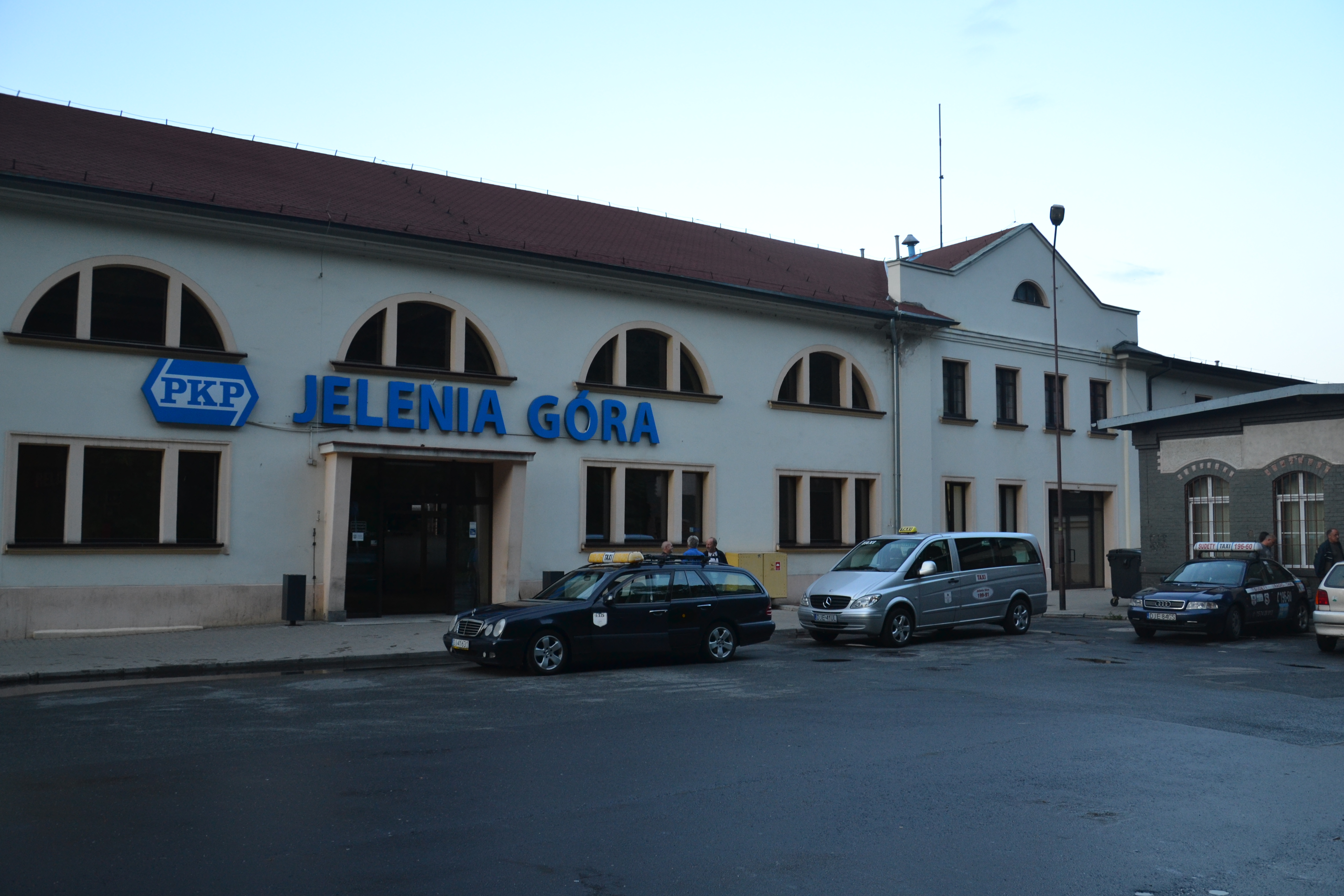 Widok dworca kolejowego w Jeleniej Górze od strony miasta